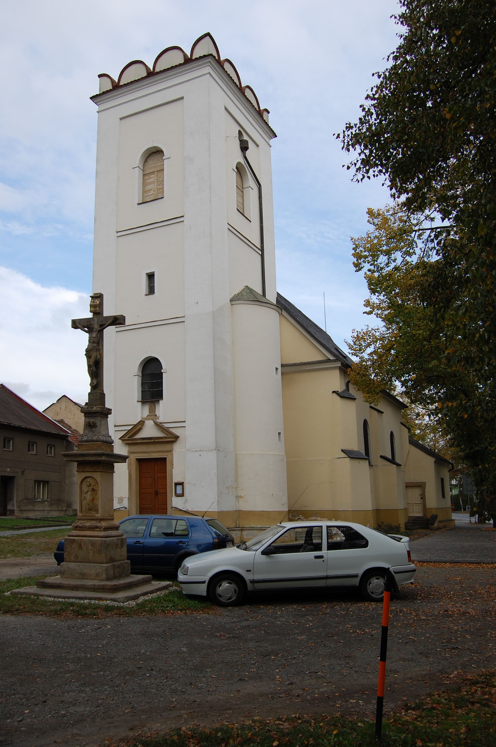 Kostel svaté Barbory - čelní pohled, Selské náměstí, Olomouc - Chválkovice